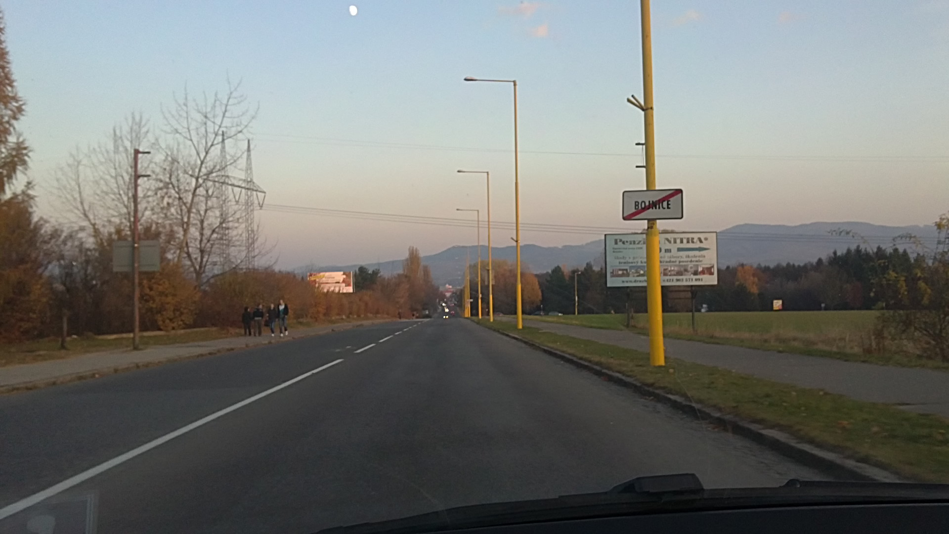 Prievidzska cesta v Bojniciach